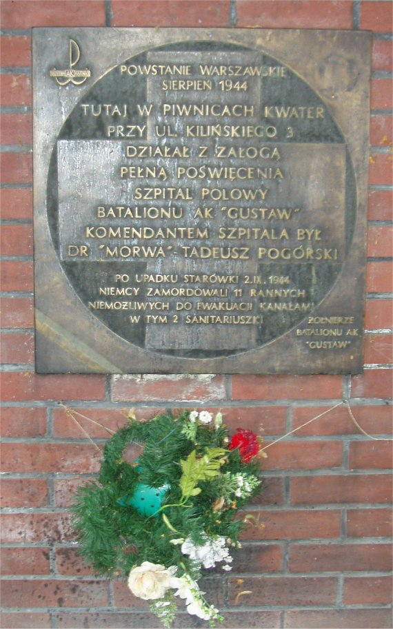 Przy ul. Kilińskiego w Warszawie (fot Zu)